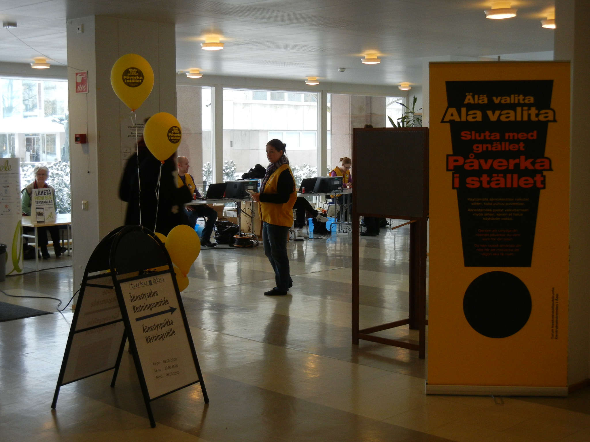 Ennakkoäänestystä Turun yliopistolla presidentinvaaleissa 2012.